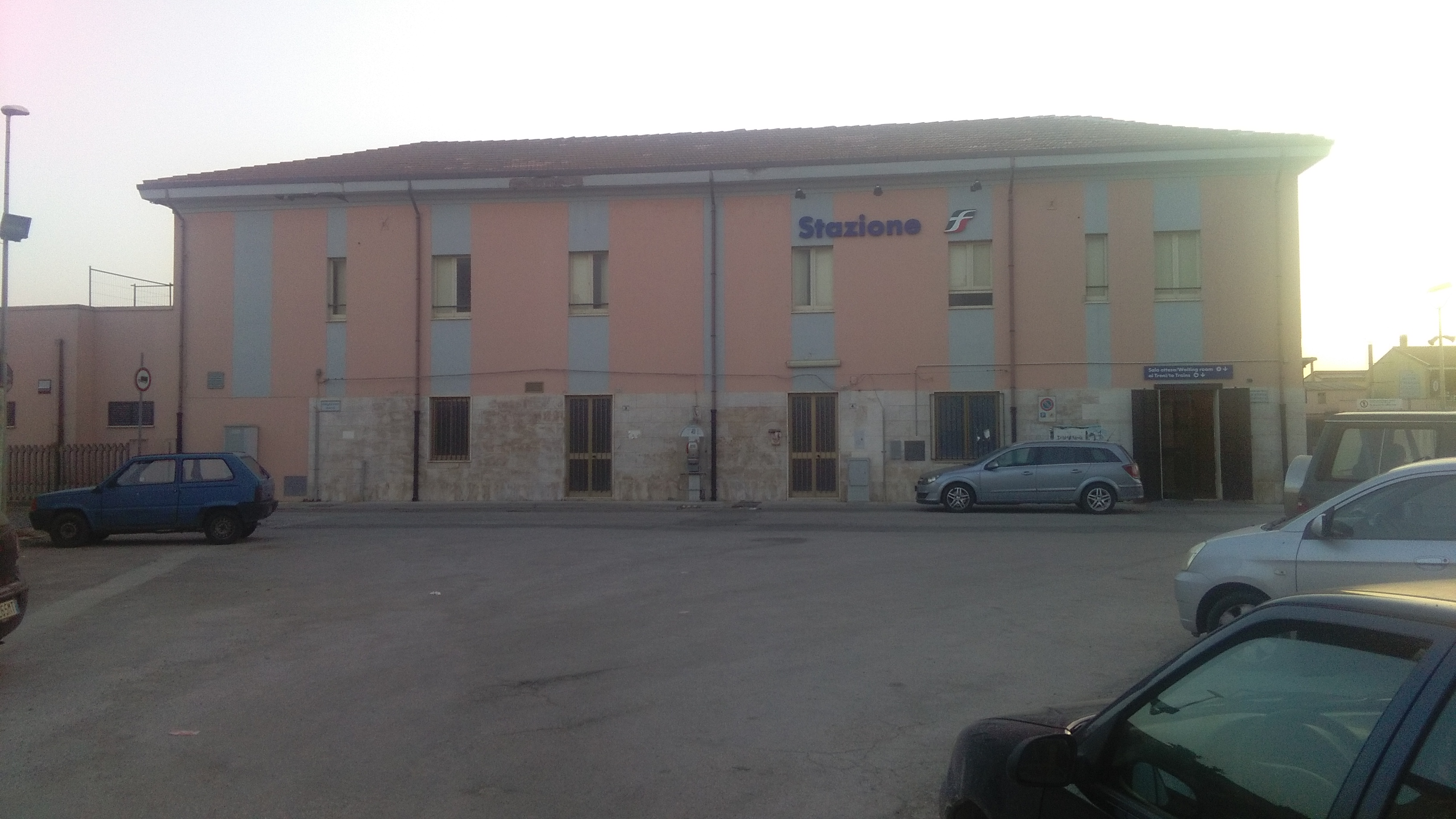 Edificio della Stazione di Villasor davanti al vecchio parcheggio